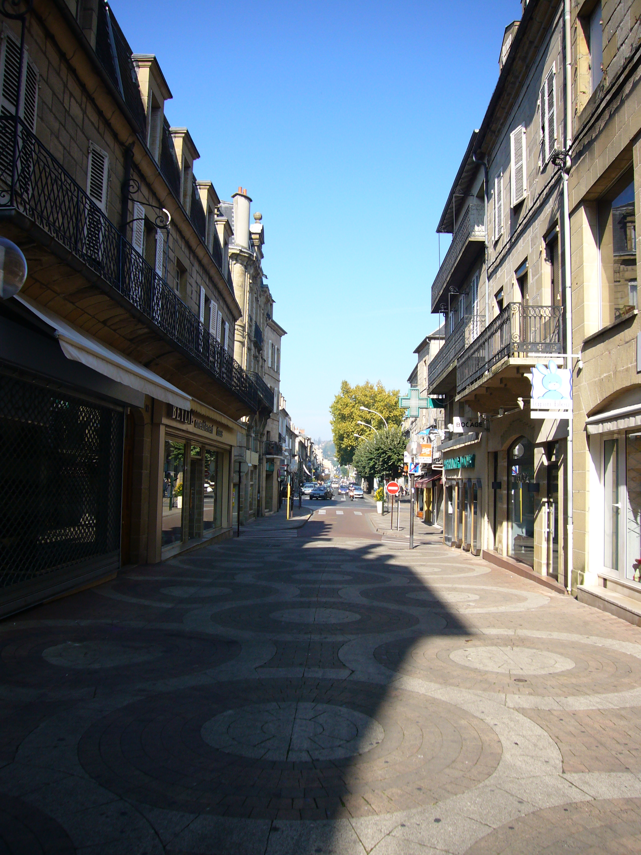 Brive-la-Gaillarde (Corrèze, France) : rue Toulzac et avenue de Paris.